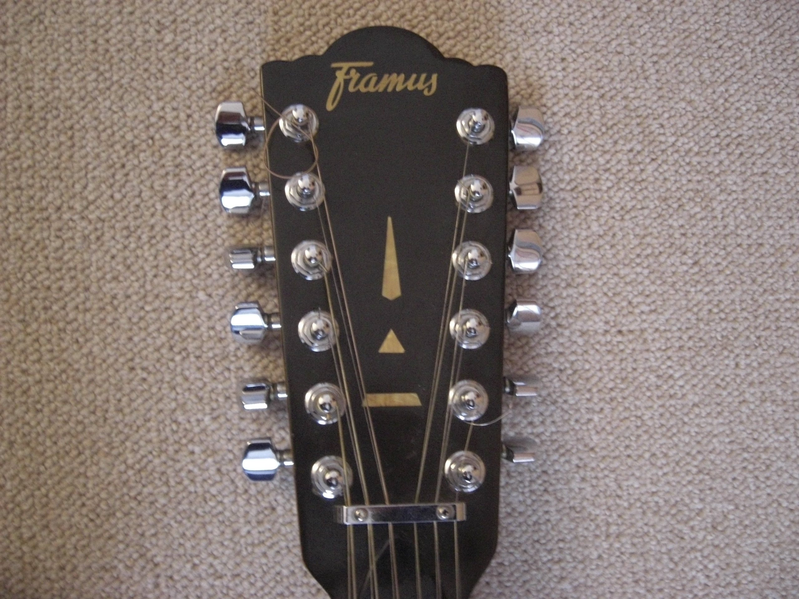 Kopfplatte Framus Jumbo 12string mit typischem Framus-Logo